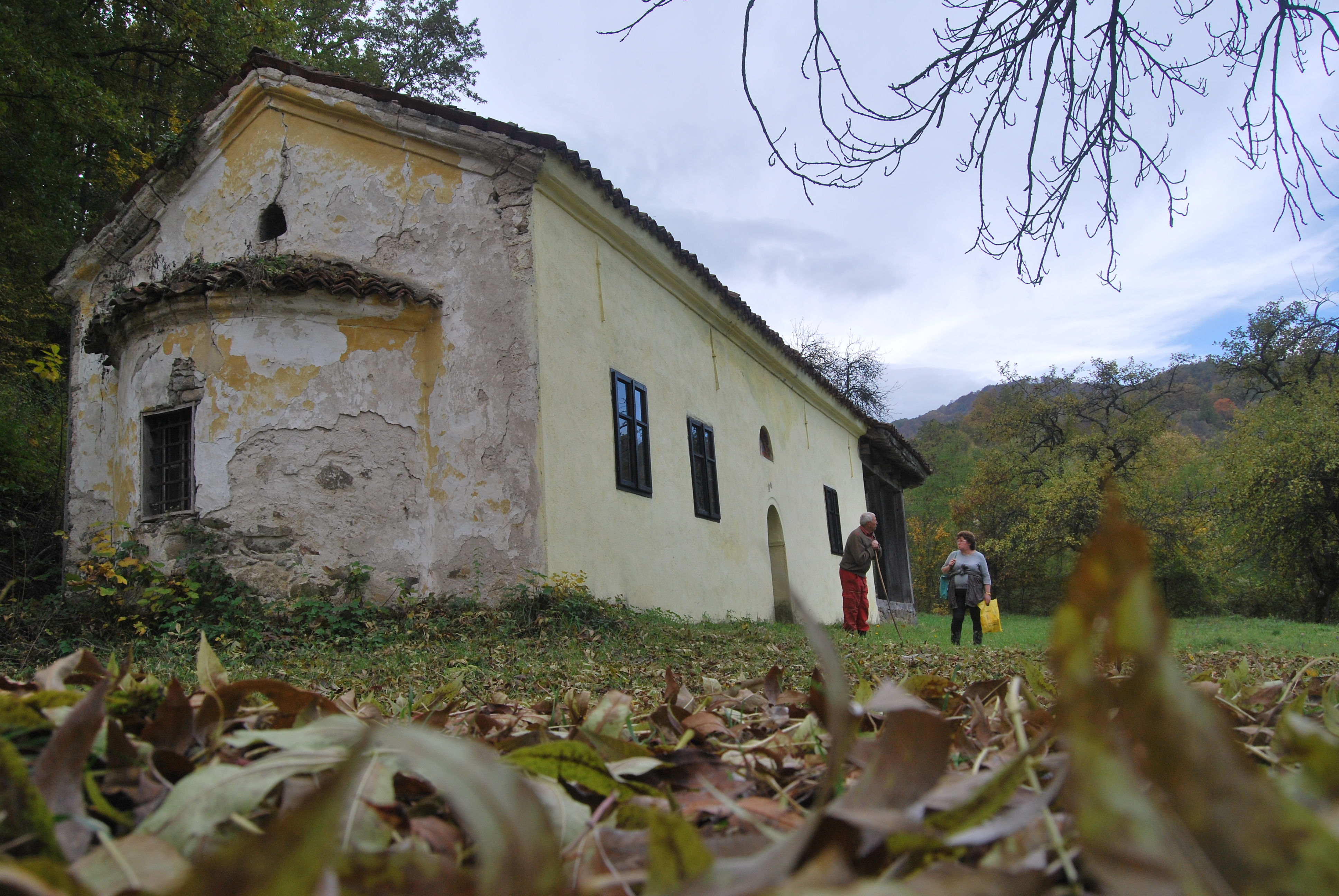 Crkva je sagradjenja na starim temeljima 1838 godine ,njen ktitor i graditelj bio je , tada mocan i pismen svetenik pop Radenko Gmitrovic.